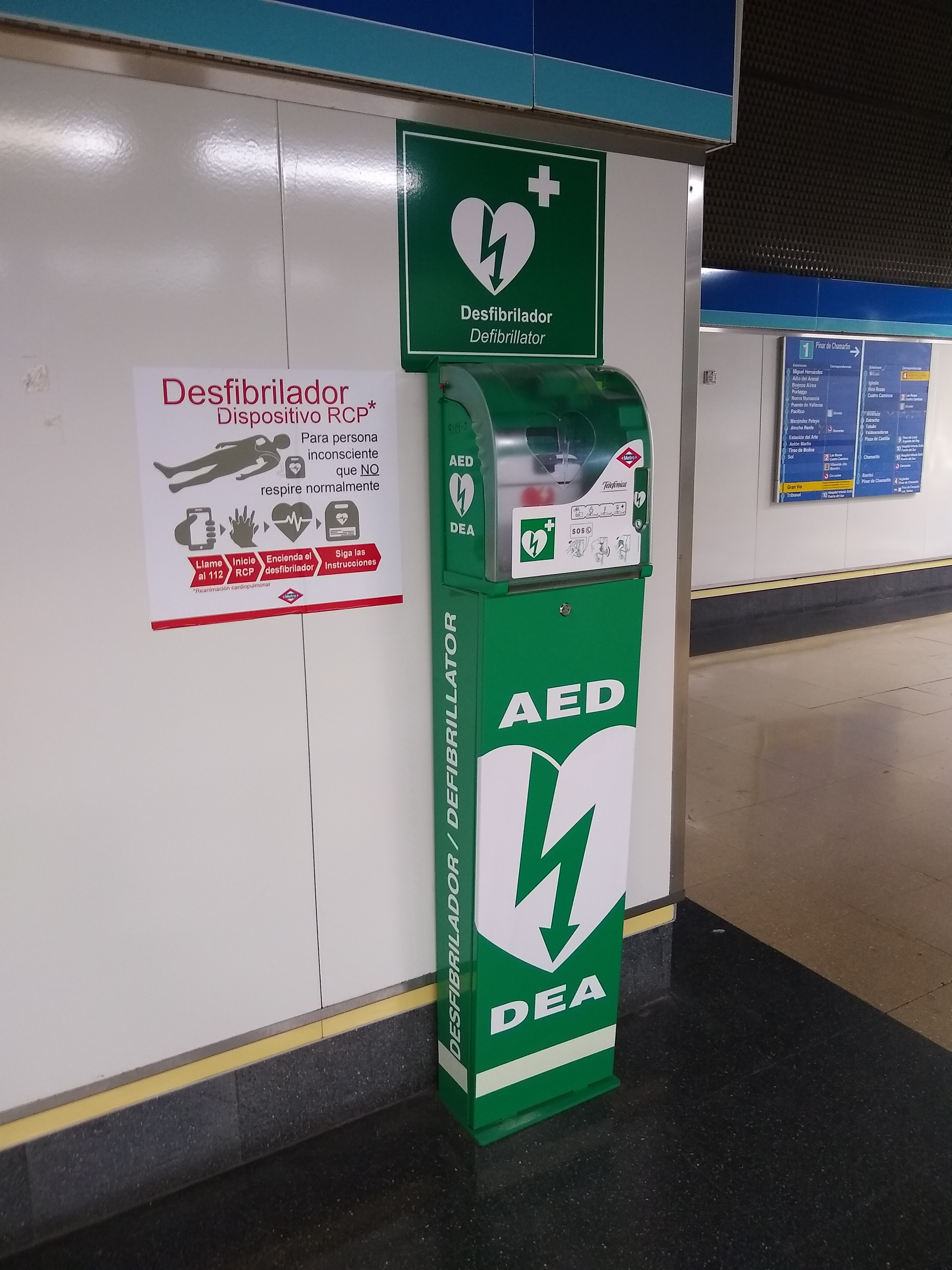 Un desfibrilador en la estación de Sierra de Guadalupe